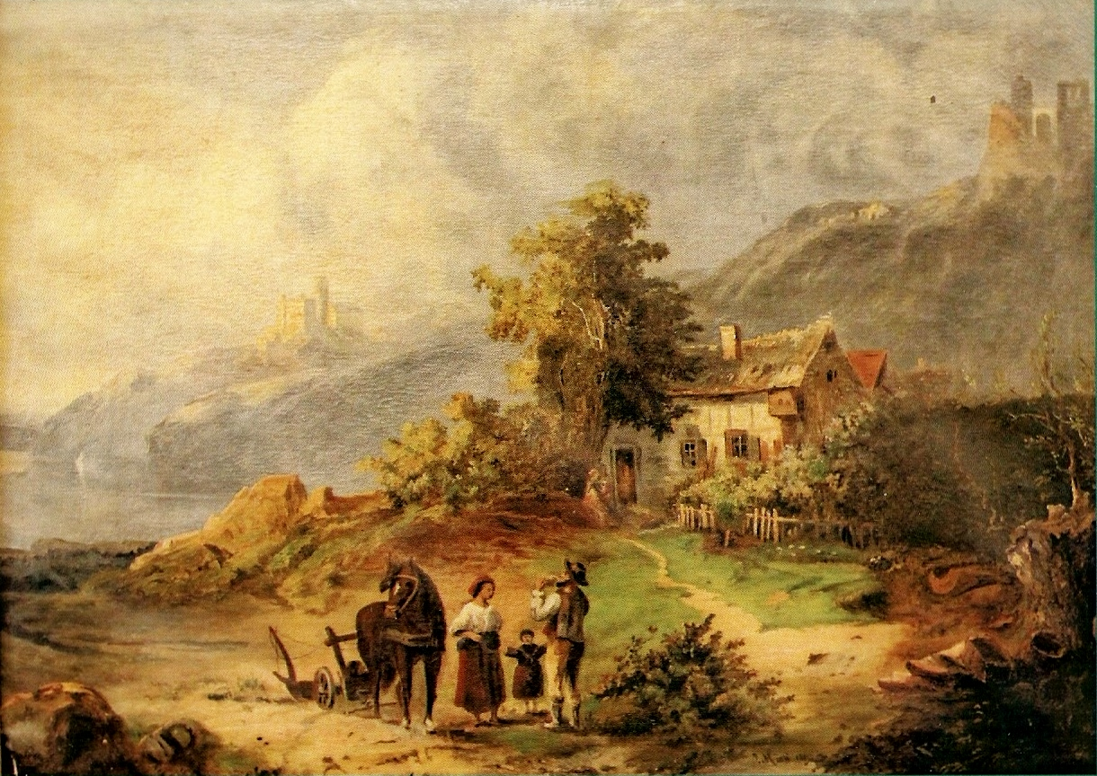 "Alpenmotiv", gemalt 1875 vom deutsch-dänischen Maler Johannes Mück (1831-1919). Dieses Bild war auf dem Titel des Begleitheftes zur Sonderausstellung "MÜCK - en kunstmalerfamilie i Haderslev og Hamborg" (vom 1. September - 20. Oktober 2013) im Museum Sønderjylland in Haderslev abgebildet.